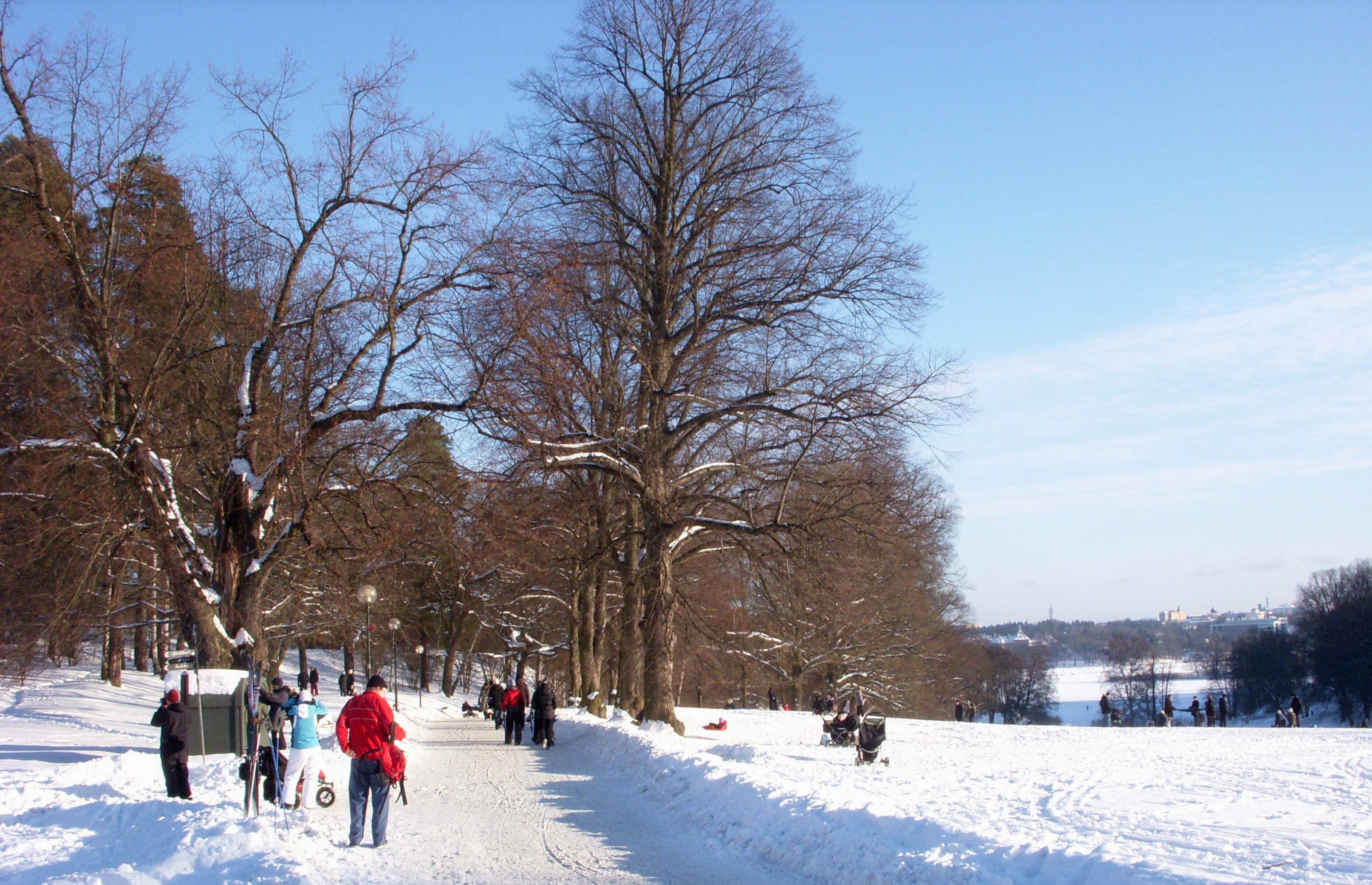 Hagaparkens allé intill pelousen mellan koppartälten och Gustav III:s paviljong